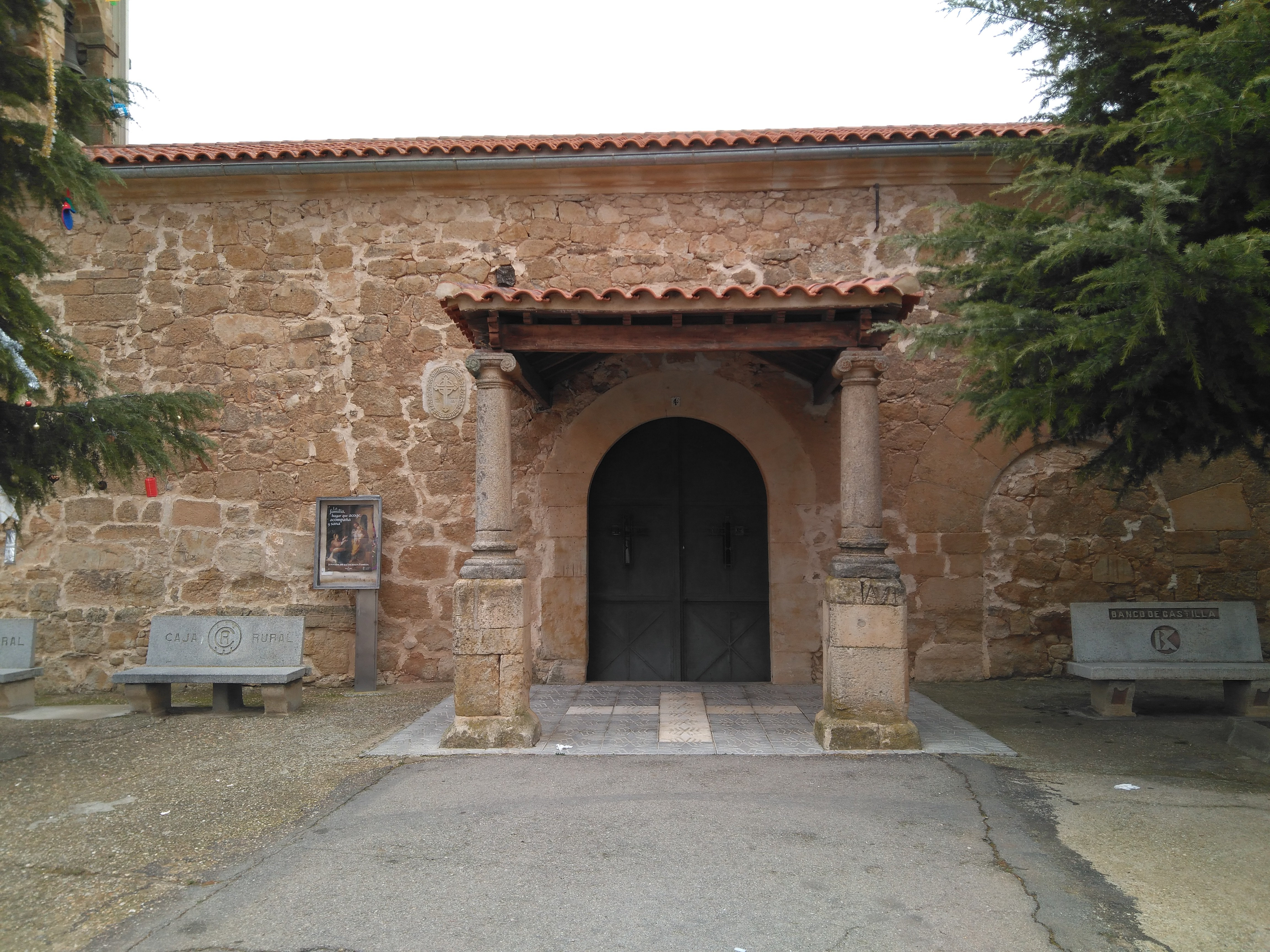 Portada principal de la Iglesia de Barbadillo, con dos columnas jónicas que flanquean la entrada principal.